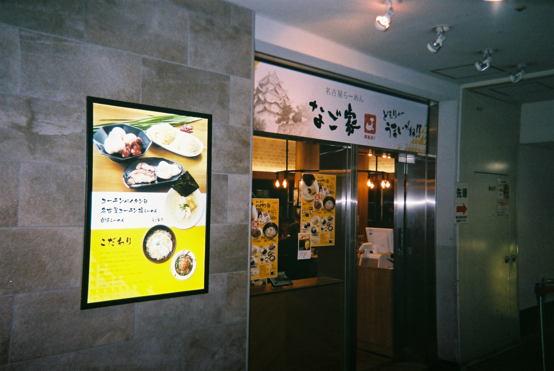 名古屋ラーメン店「なご家」